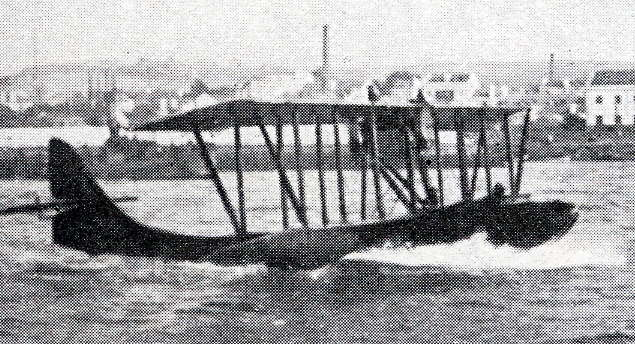 Hidroavião D. D. 3, no rio Tejo, junto a Lisboa.